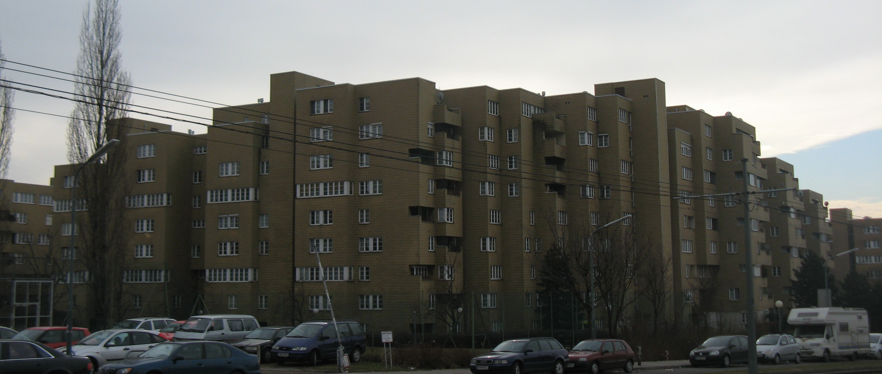 Karl-Wrba-Hof (1978-83) von Rupert Falkner, Neilreichgasse 111-115, Wien-Favoriten